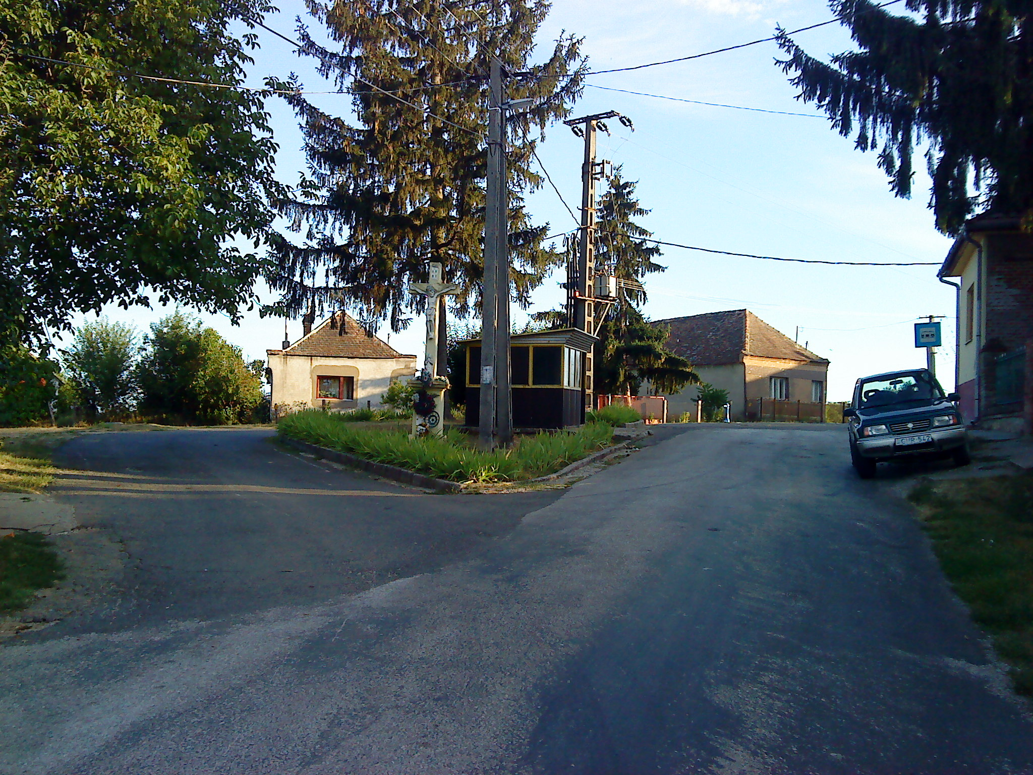 Szőke buszfordulója